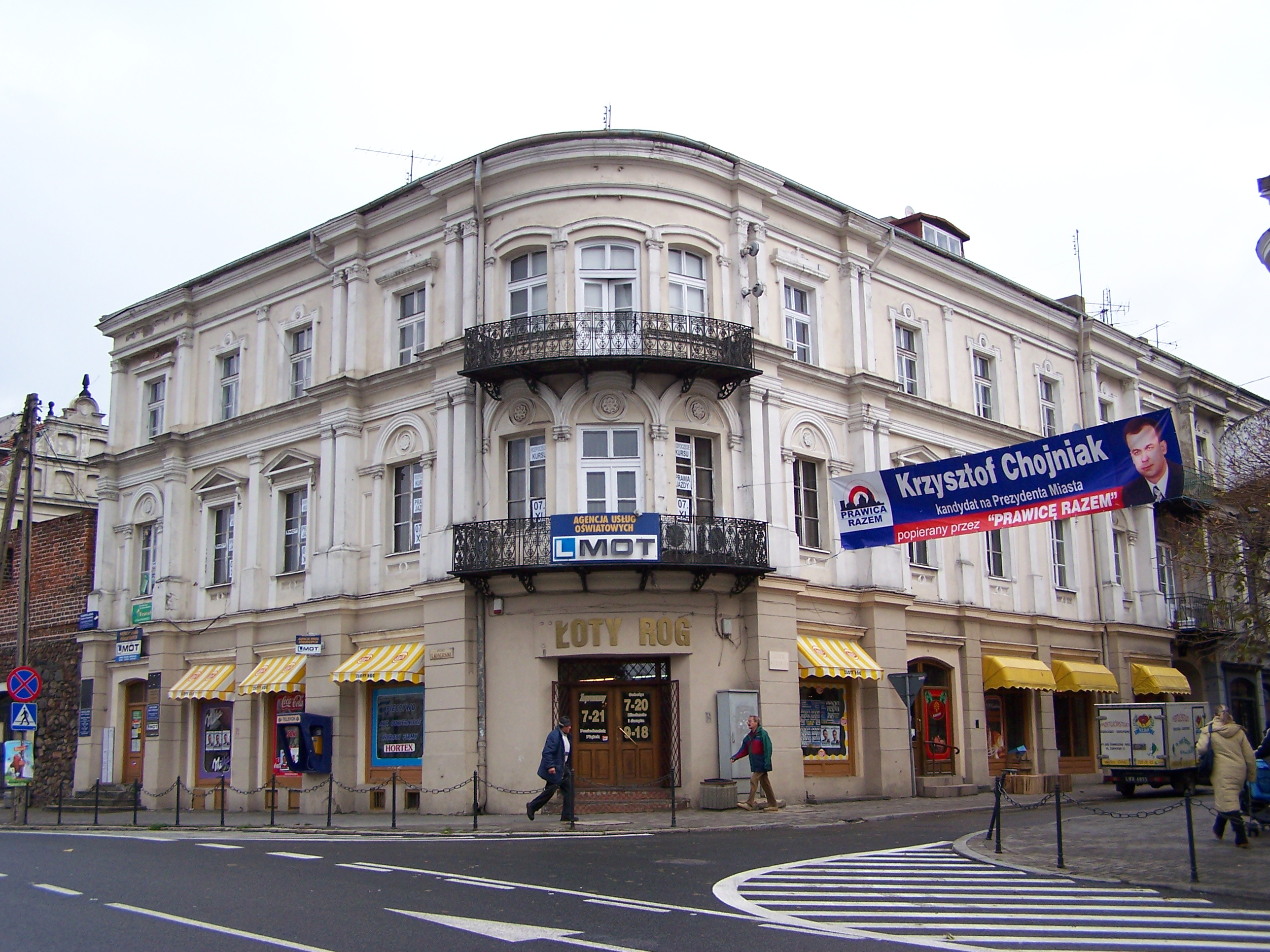 Kamienica narożna w Piotrkowie Trybunalskim (na Placu Kościuszki, przy ul. Sieradzkiej). "Zagrała" rolę Domu Bankowego Kramera w filmie "Vabank". (zabytek nr 426 z 23.03.1992)